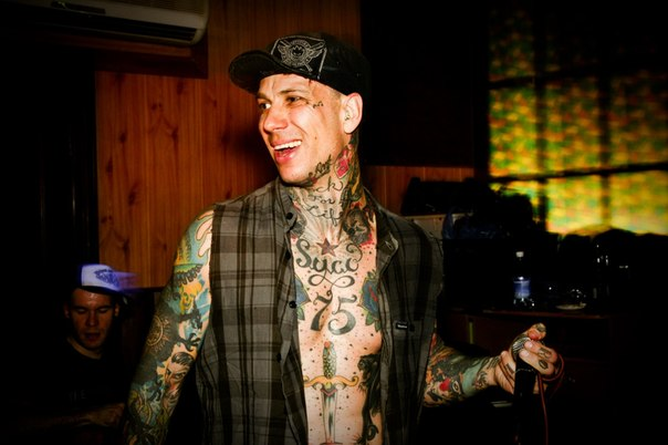 Вокалист Pipes and Pints Сико Майк